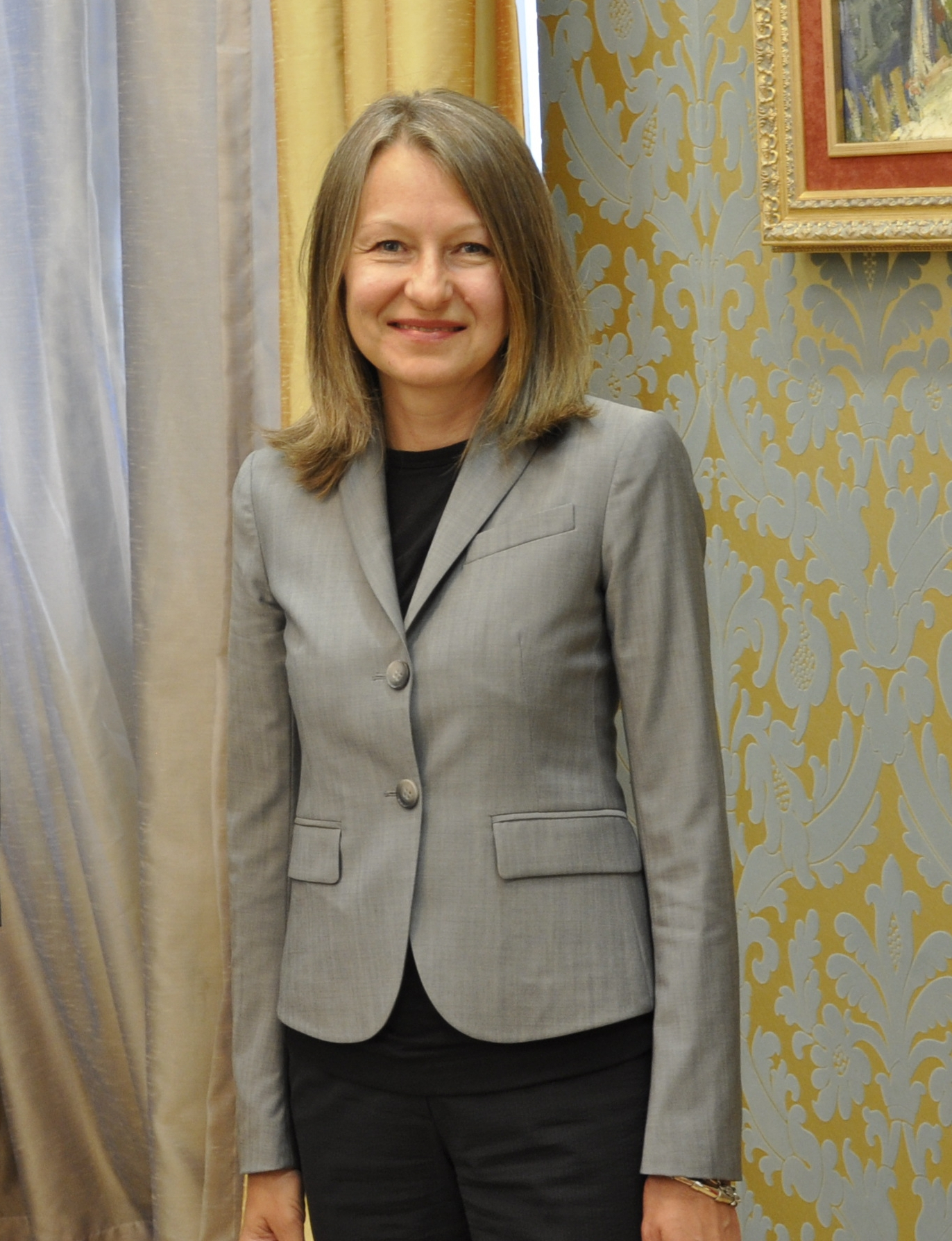 Eesti uus suursaadik Montenegros Tiina Intelmann andis Montenegro presidendile Filip Vujanovićile üle oma volikirja.